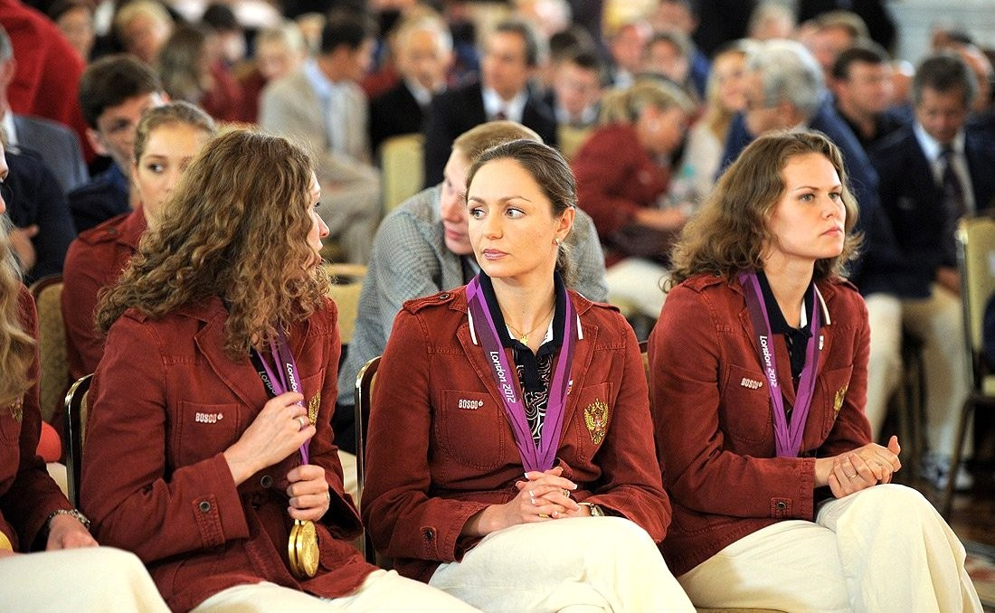 Российские синхронистки - Ищенко, Давыдова, Громова